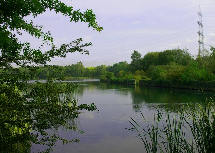 Ölbach - aufgestauter Ölbachteich an der Stadtgrenze von Bochum und Witten